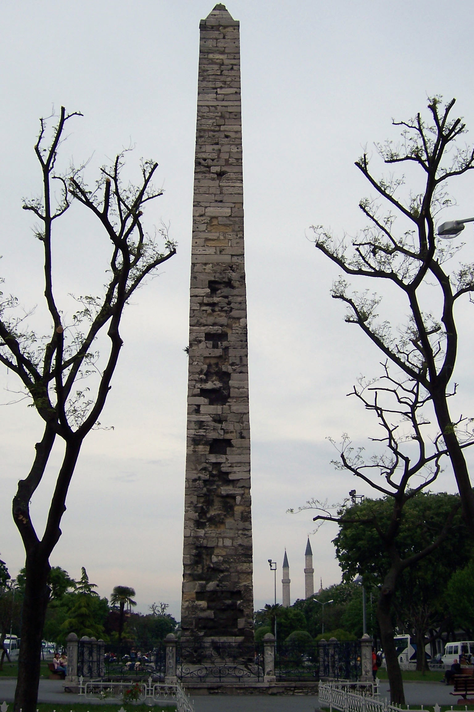 Walled Obelisk (Örme Dikilitaş), Istanbul, Turkey